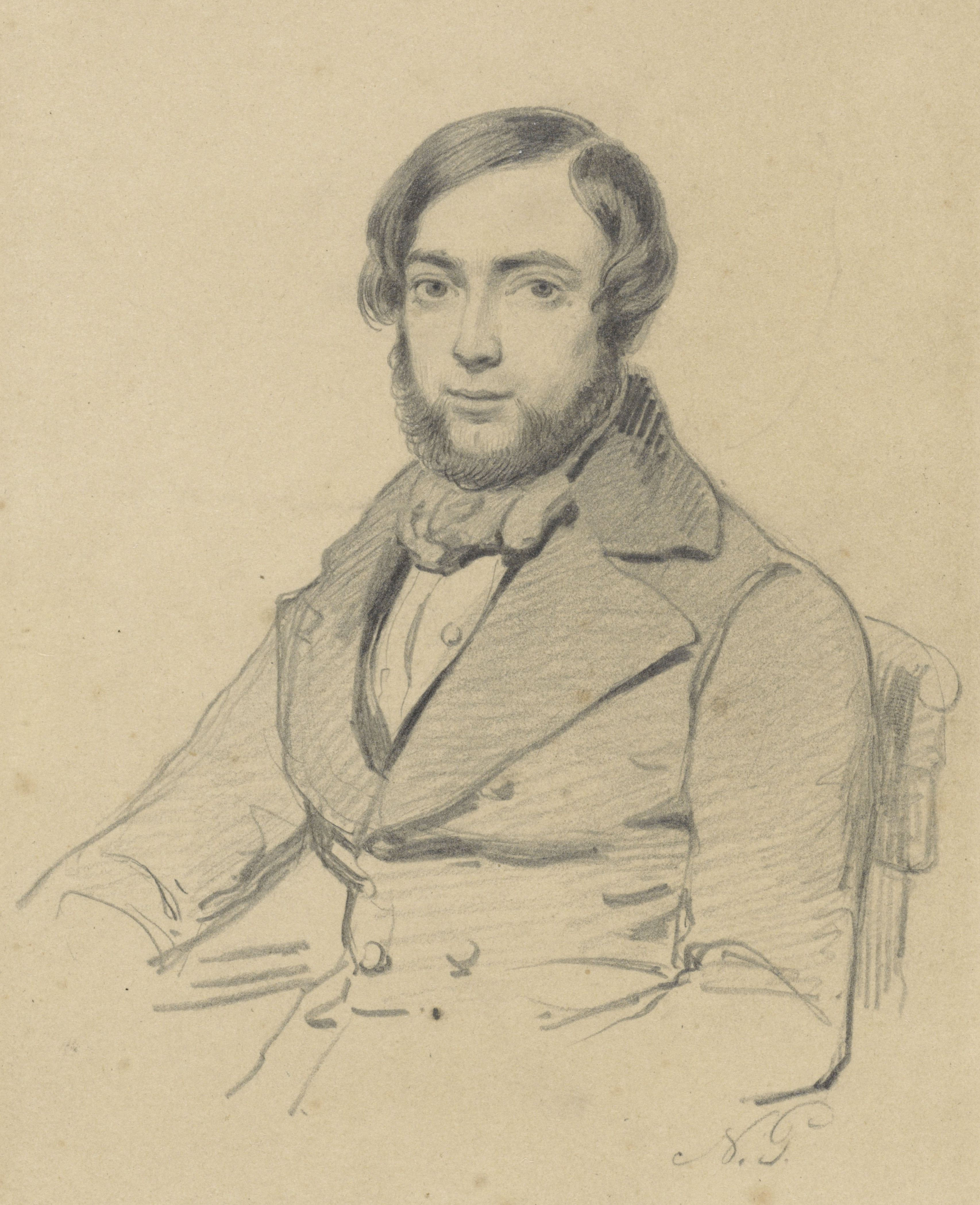 Portret van Johann Conrad Hamburger.